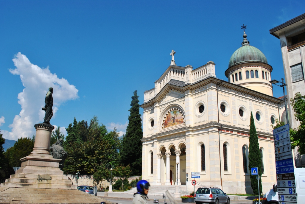 Monumento ad Alessandro Rossi This is a photo of a monument which is part of cultural heritage of Italy.